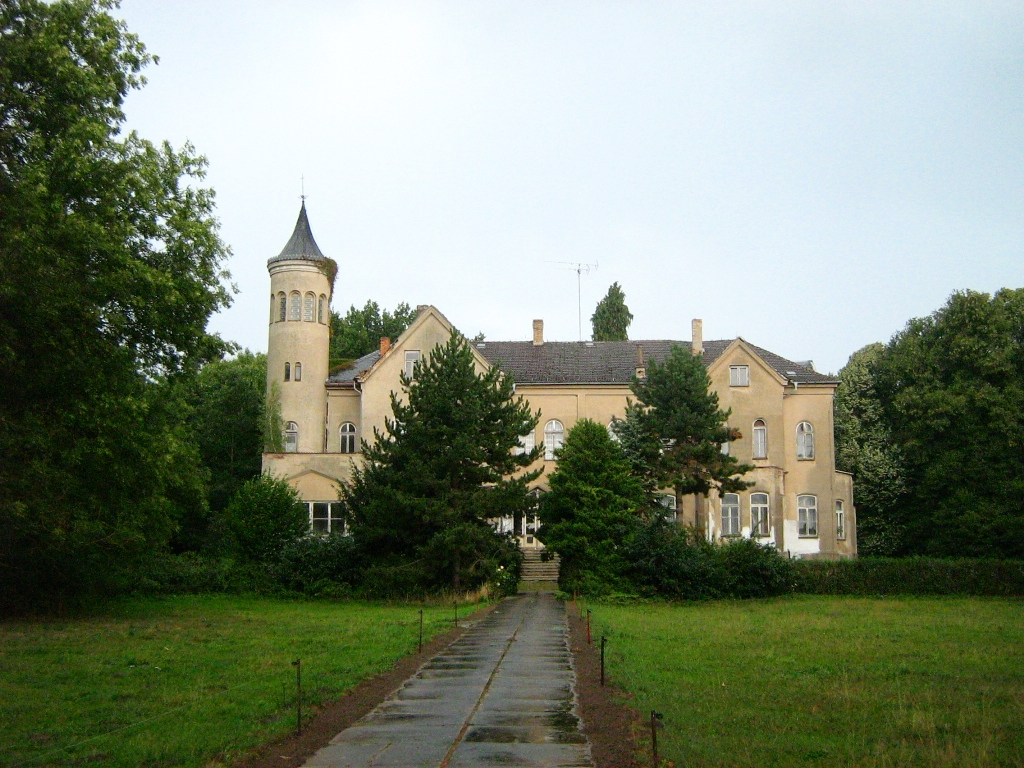 Gutsschloss in Dudendorf (Gemeinde Dettmannsdorf, Landkreis Nordvorpommern, Mecklenburg).